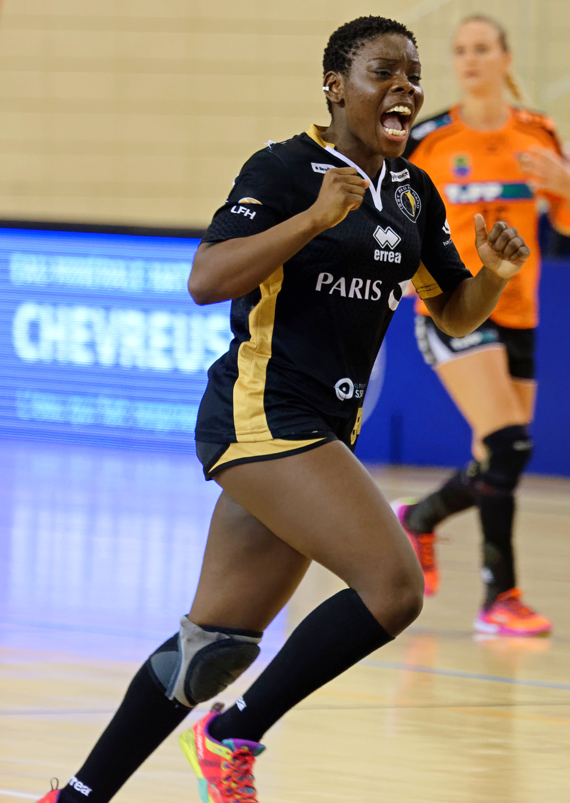 Match de coupe EHF entre Issy Paris Hand et Erd HC. A Issy Les Moulineaux, le 18 novembre 2017.